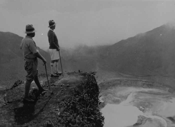 foto. Twee bergbeklimmers staan op een rotspunt van de vulkaan Bukit Kaba en kijken uit over het vulkaanlandschap